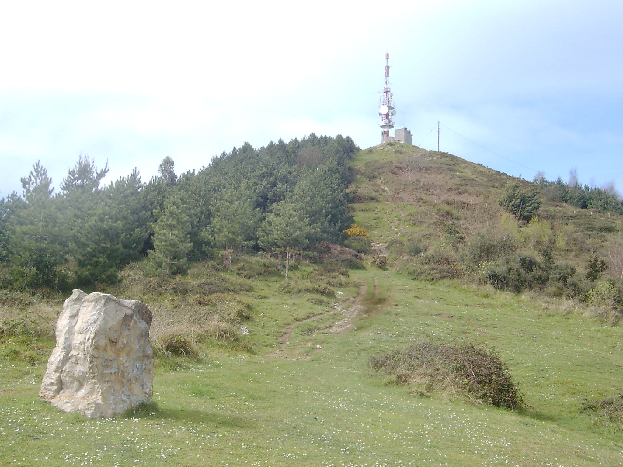 Serantes mendiaren tontorra